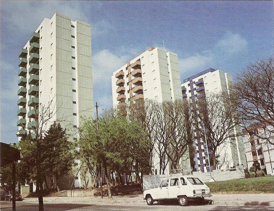 Las torres del Conjunto San Pedrito (Barrio Mariano Castex) poco después de su inauguración, hacia 1980. Se encuentran en el barrio de Flores, en Buenos Aires, Argentina.